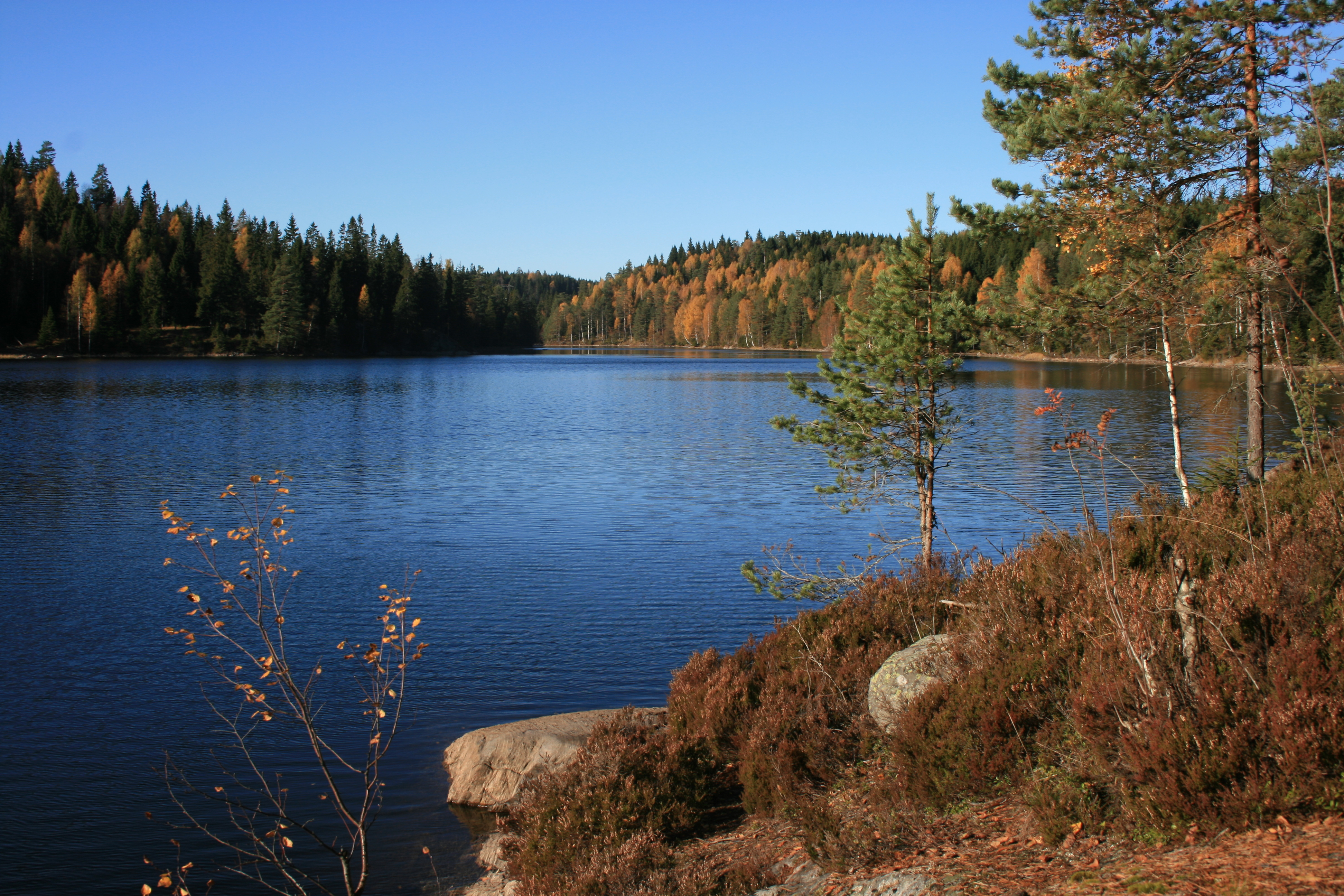 Halssjøen ligger 272 meter over havet nordvest for Drettvannet i Losbyvassdraget, Lørenskog kommune i Akershus. Vannet er demmet opp i sydenden, og er drikkevannskilde.